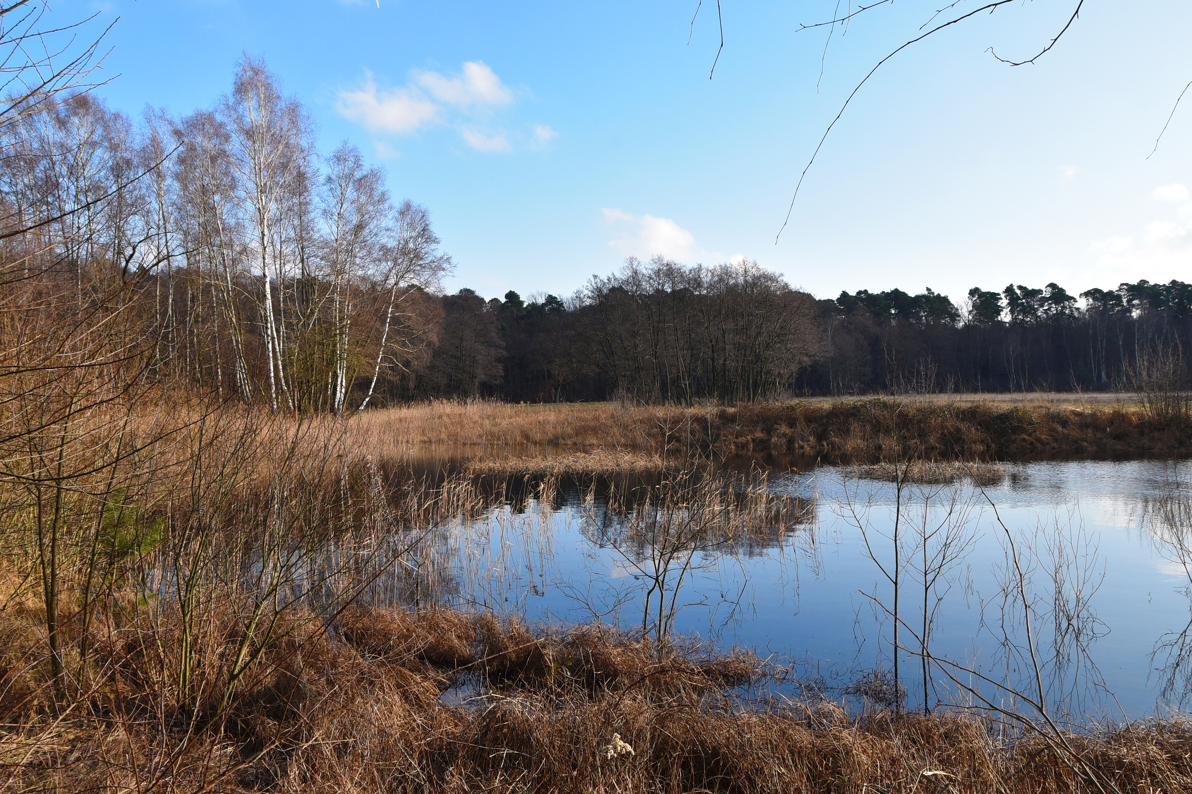 NSG_Bruch von Gravenbruch_Tümpel in der Müllerwiese_6